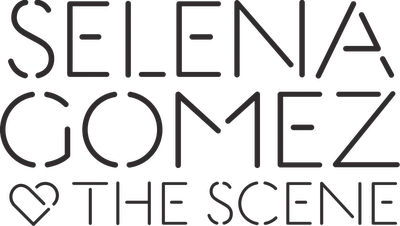 Selena Gomez & The Scene Logo